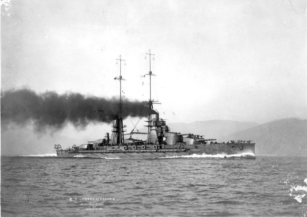 RN Conte di Cavour - original structure